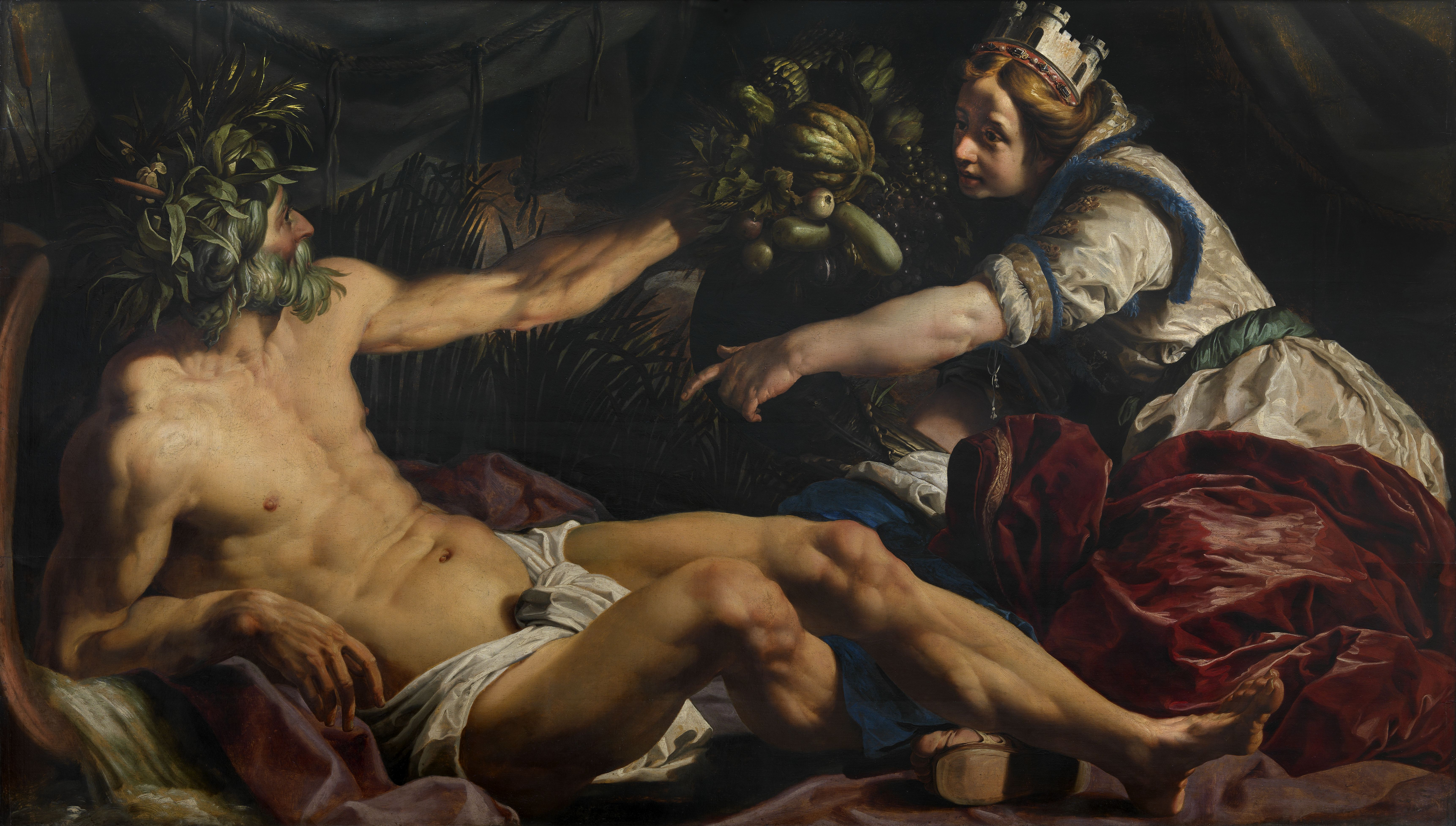 schilderij ( Abraham Janssens I( koninklijk museum voor schone kunsten antwerpen